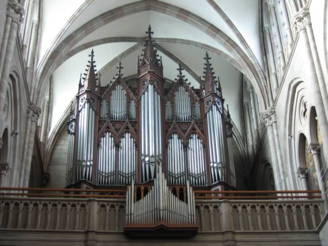 Grandes-Orgues Cavaillé-Coll de l'église St-Etienne de Mulhouse. Cet orgue a été construit en 1863 par Aristide Cavaillé-Coll dans un buffet de la maison Blumer (Strasbourg). A noter le positif de dos, qui a été ajouté en 1963 par Max Roethinger. Duomaxw